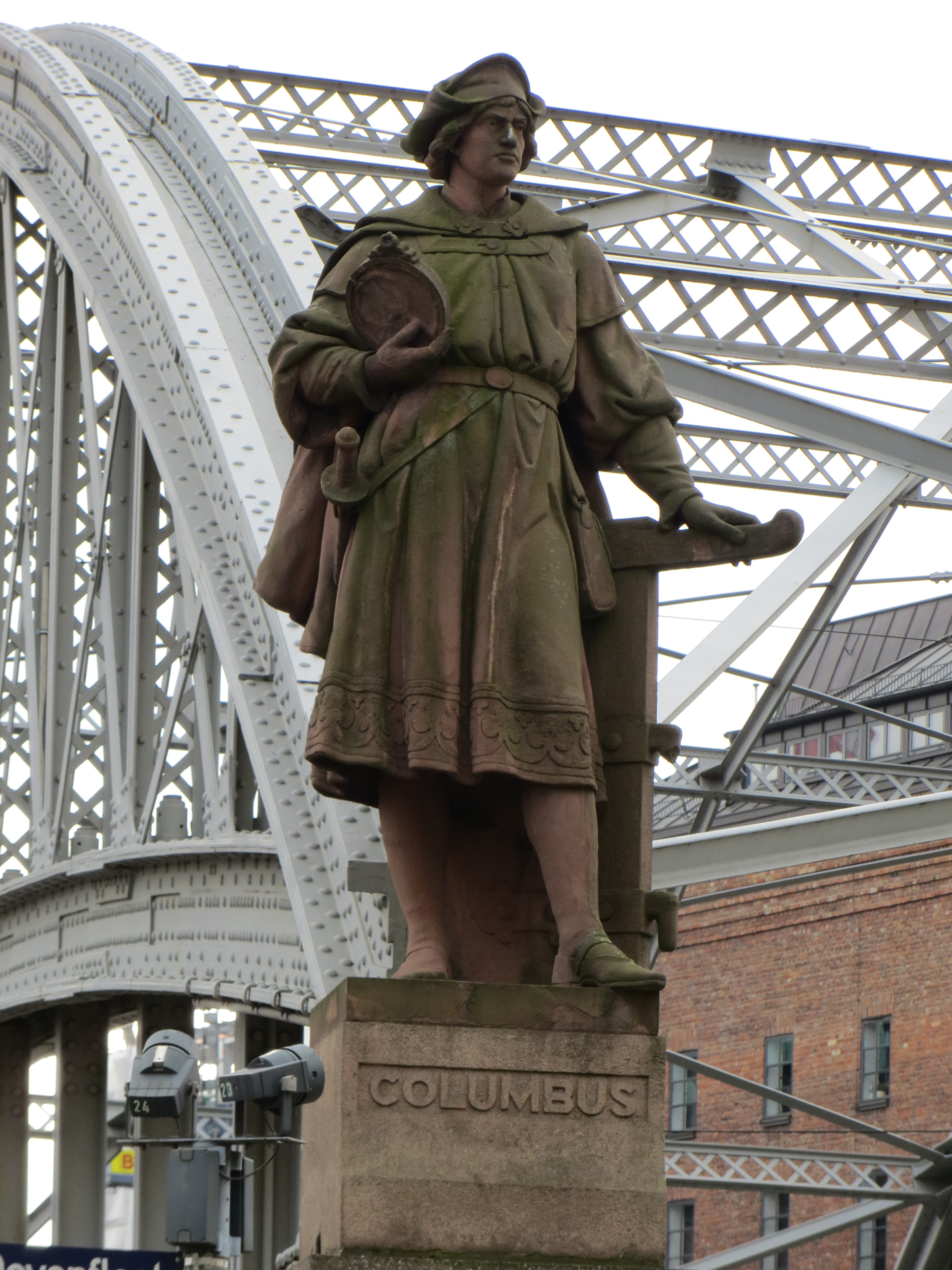 Columbus-Standbild beziehungsweise Kolumbus-Statue an der Kornhausbrücke (Hamburg) This is a photograph of an architectural monument.